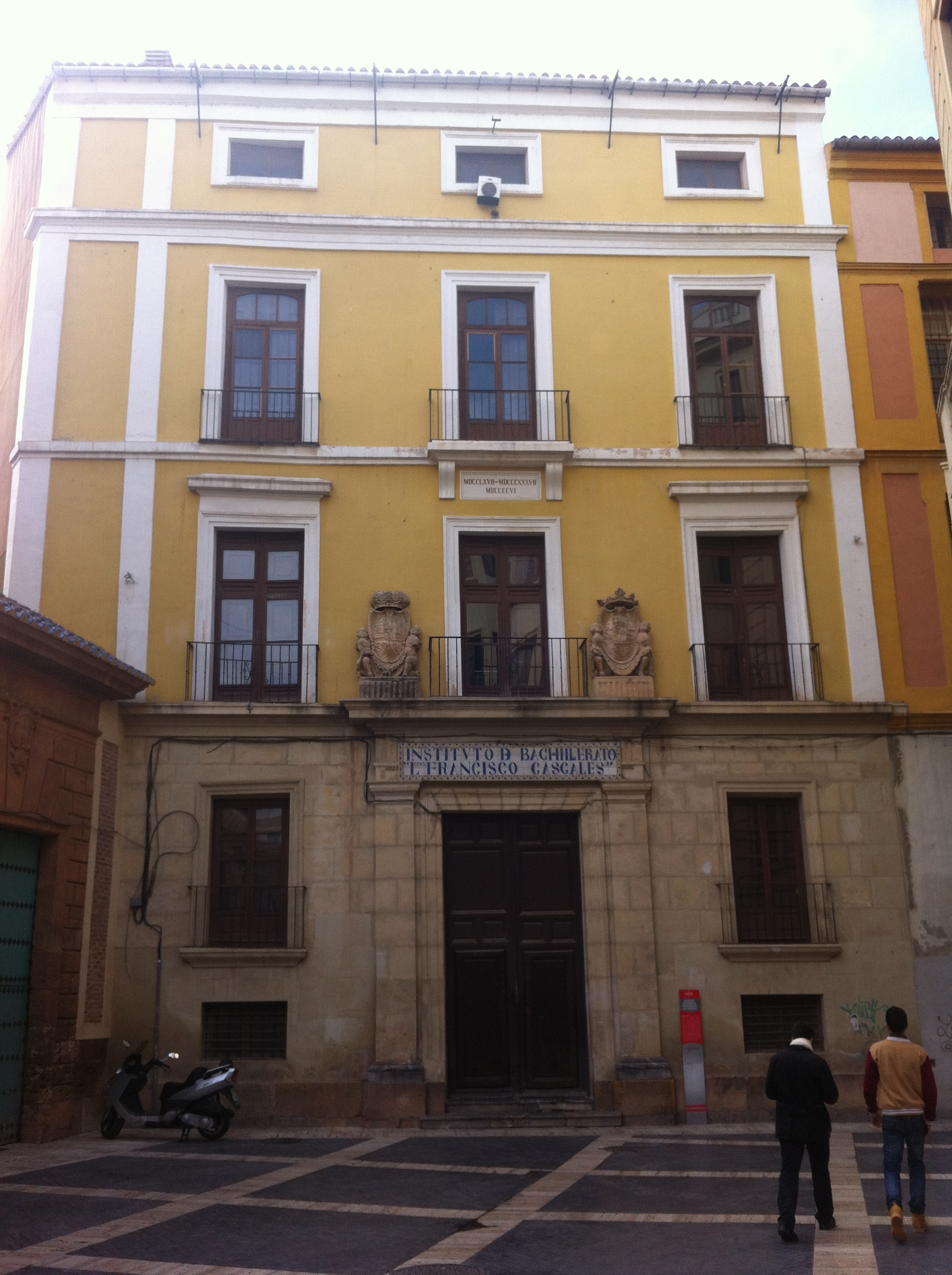 Fachada principal del antiguo Colegio de Teólogos de San Isidoro (siglo XVIII), Murcia, Región de Murcia, España.